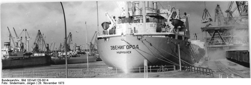 Rostock, Überseehafen, Frachter ADN-ZB Sindermann 28.11.73-ku - Rostock: Erhöhter Jahresendverkehr im Rostocker Überseehafen herrscht in diesen Wochen - Tag und Nacht werden an den Kais die in- und ausländischen Frachter gelöscht und beladen. Noch in diesem Jahr soll an den kilometerlangen Kais des Rostocker Überseehafens die hundertmillionste Tonne Güter seit der Inbetriebnahme des Hafens im Jahre 1960 umgeschlagen werden (zweiteiliges Panorama)